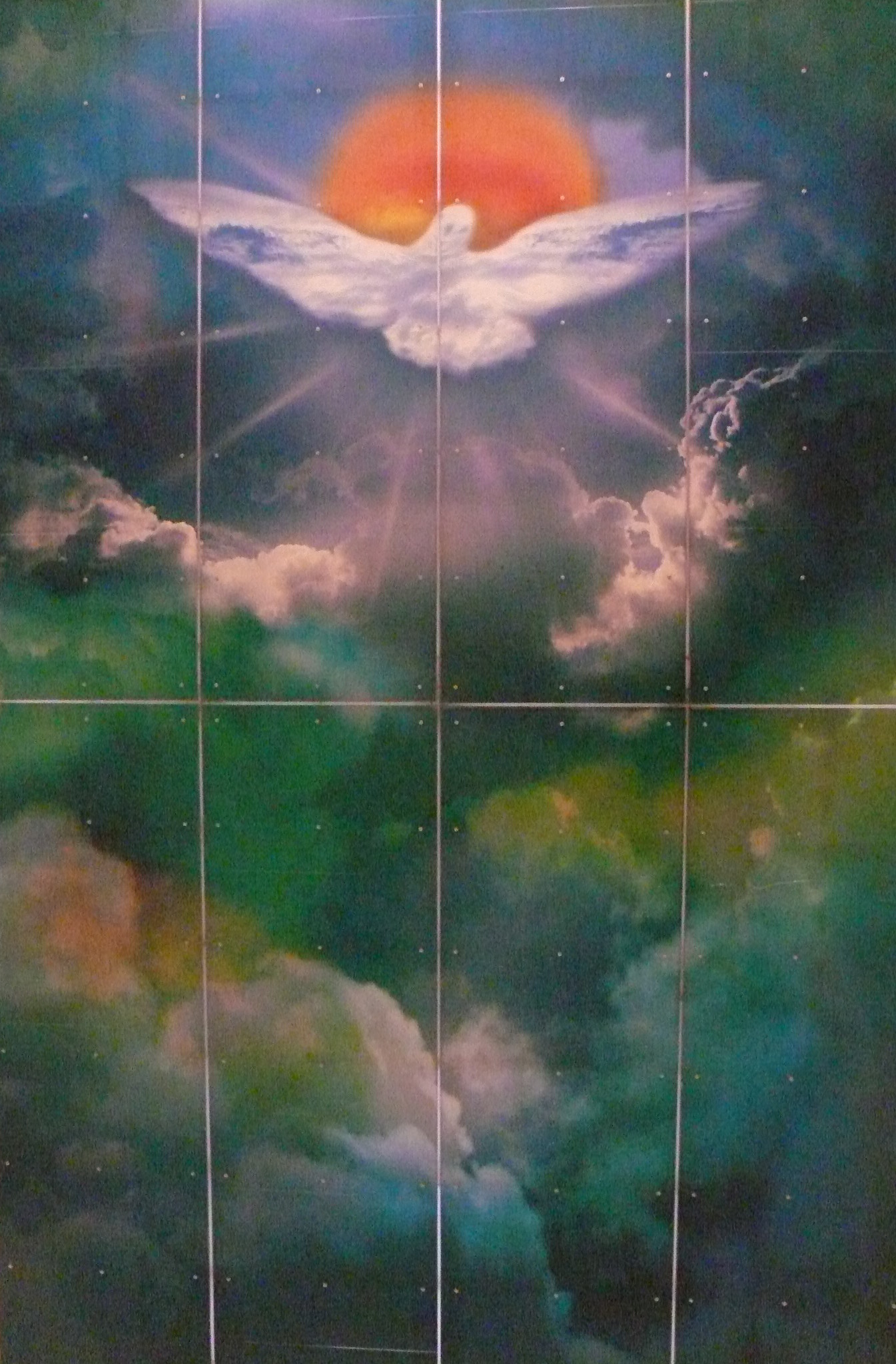 Baldachim witrażowy z wizyty Benedykta XVI z przedstawieniem Ducha Św. wśród obłoków, kościół Bogurodzicy Maryi na Jelonkach Północnych